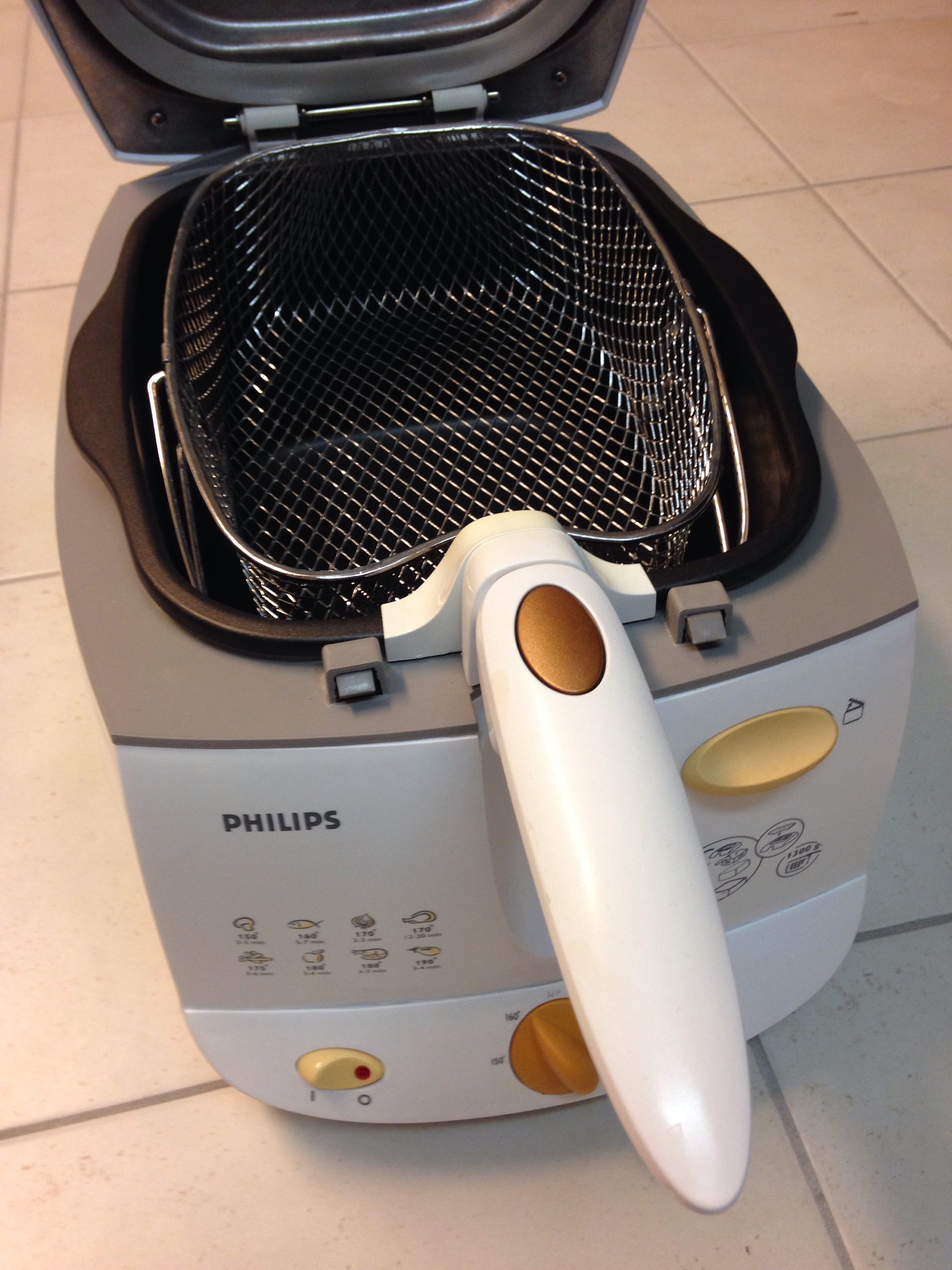 Friteuse